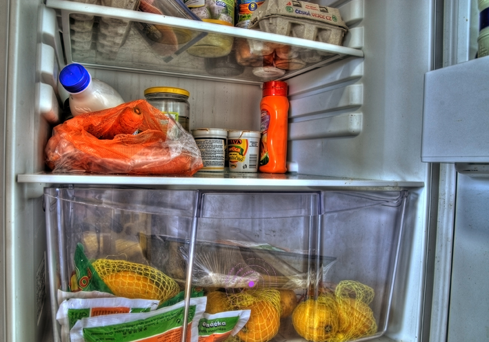 Věra Stuchelová´s photographs